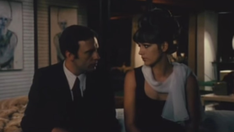 Screenshot dal film La matriarca (1968) di Pasquale Festa Campanile